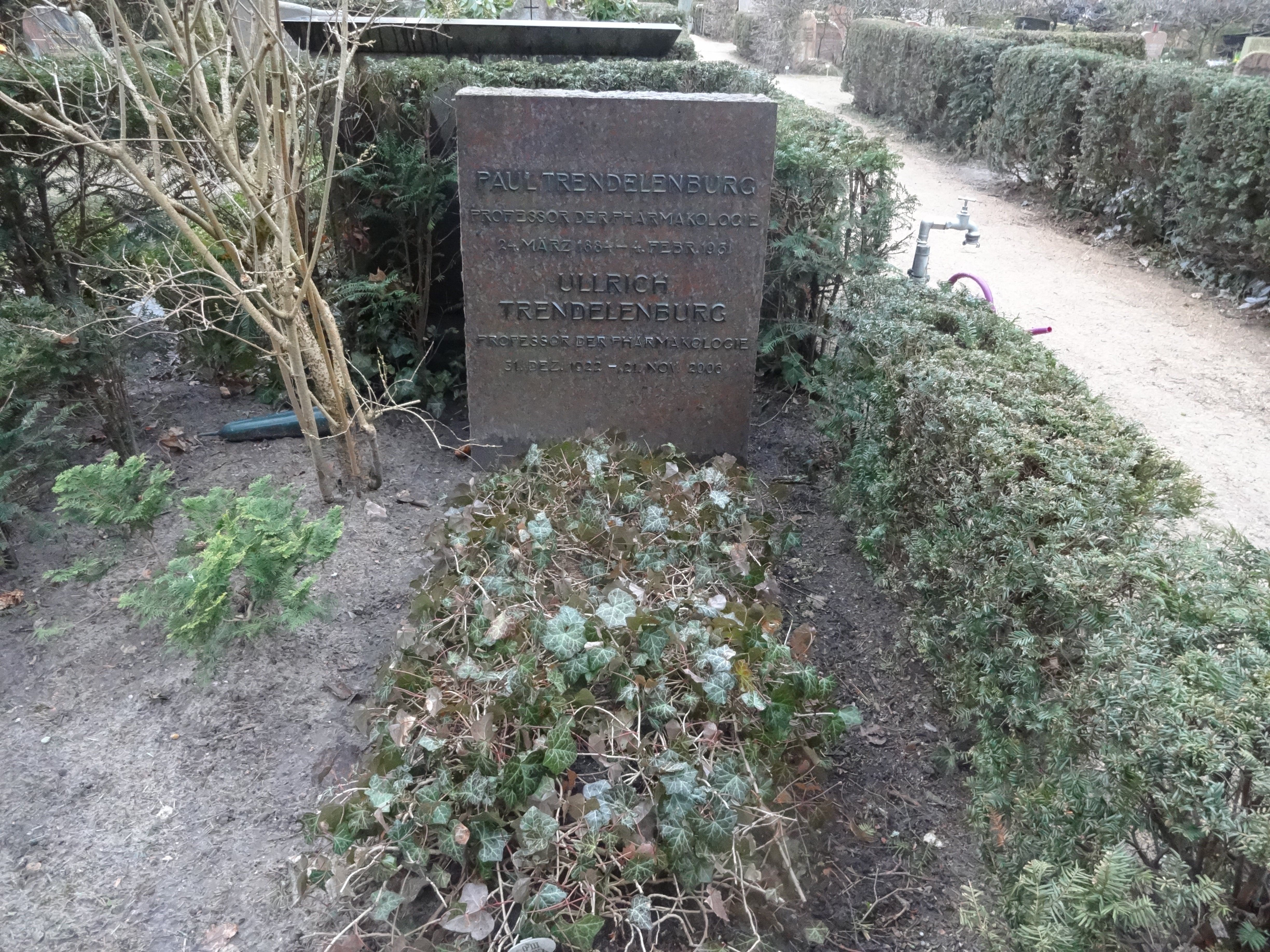 Grab der Professoren der Pharmakologie Paul Trendelenburg (1884-1931) und Ullrich Trendelenburg (1922-2006) auf dem Evangelischen Kirchhof Nikolassee in Berlin